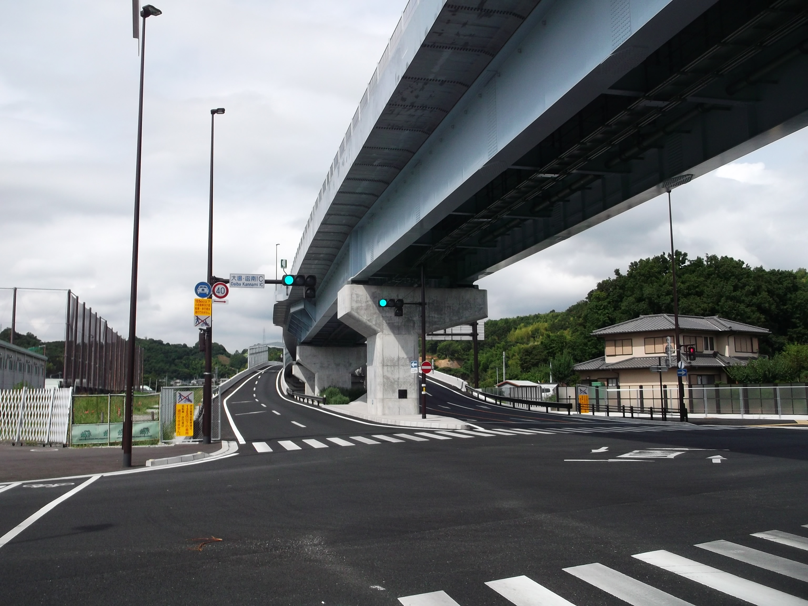 伊豆縦貫自動車道（東駿河湾環状道路) 大場・函南インターチェンジ